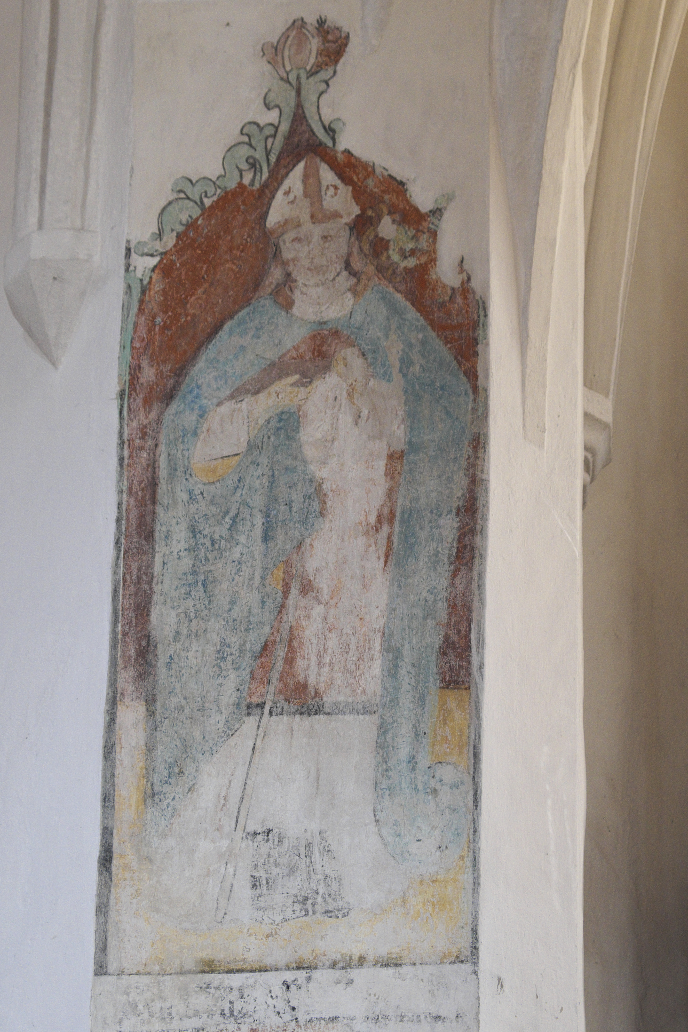 Katholische Pfarrkirche St. Jodok in Landshut (Bayern/Deutschland), Wandmalerei, Darstellung: Bischof ?